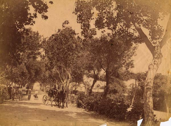 Foto del Paseo de los coches tomada entre 1888-1893 (Santa Cruz)